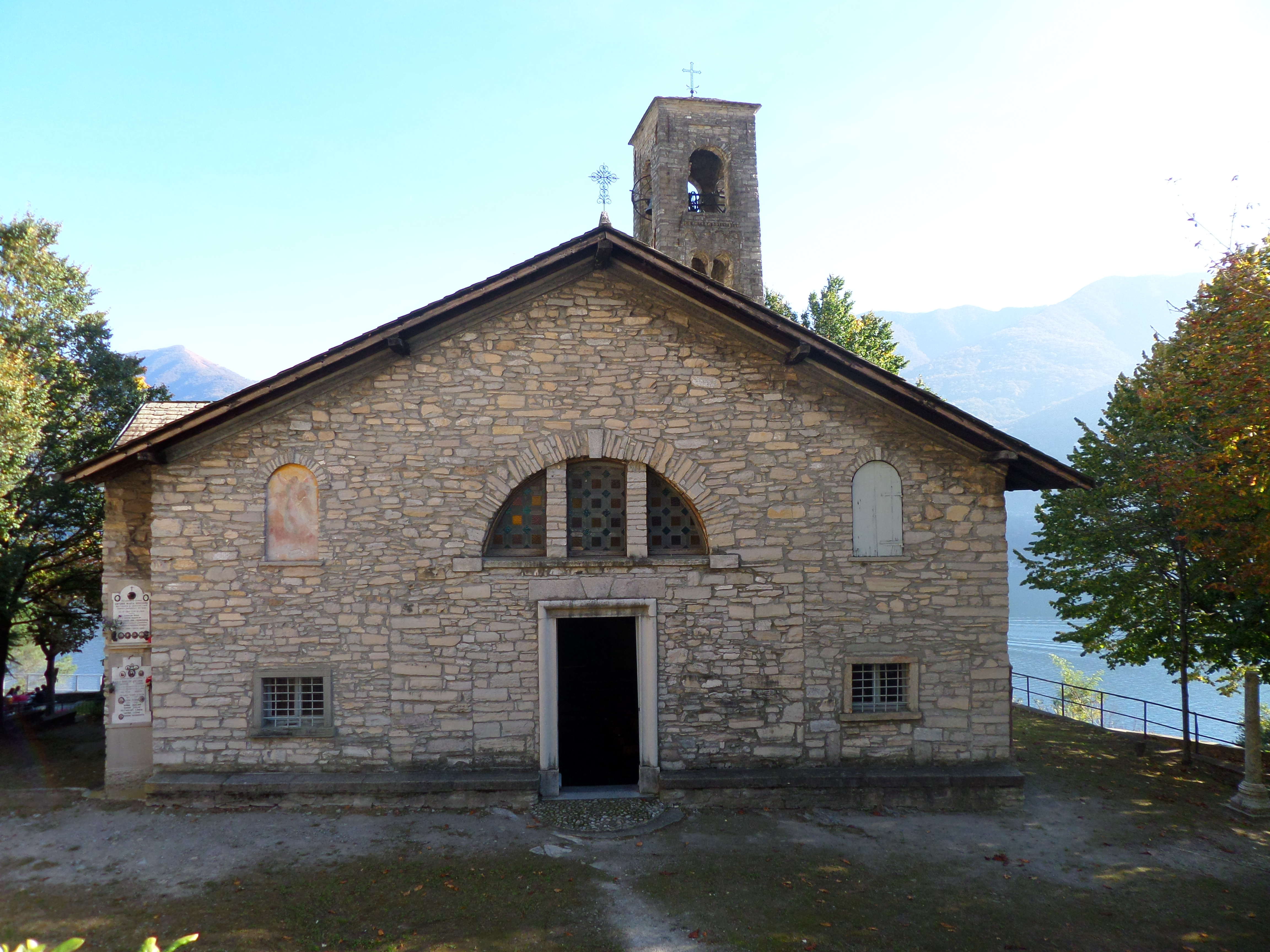 Basilica di Santa Marta, Carate Urio